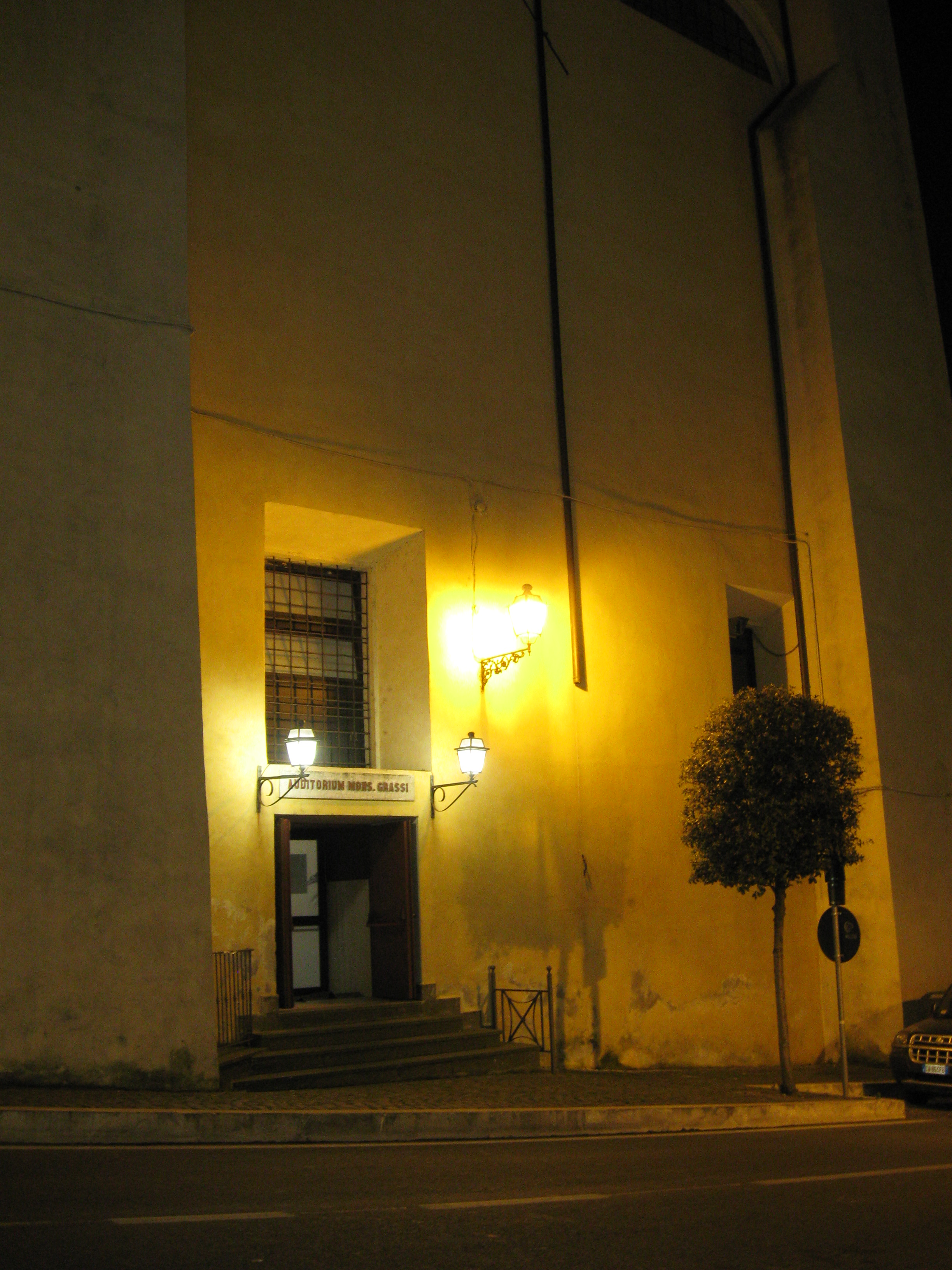 L'Auditorium monsignor Guglielmo Grassi a Marino